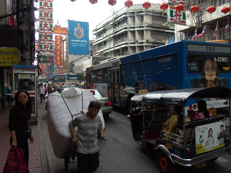 Bangkok: Chinatown, August 2004